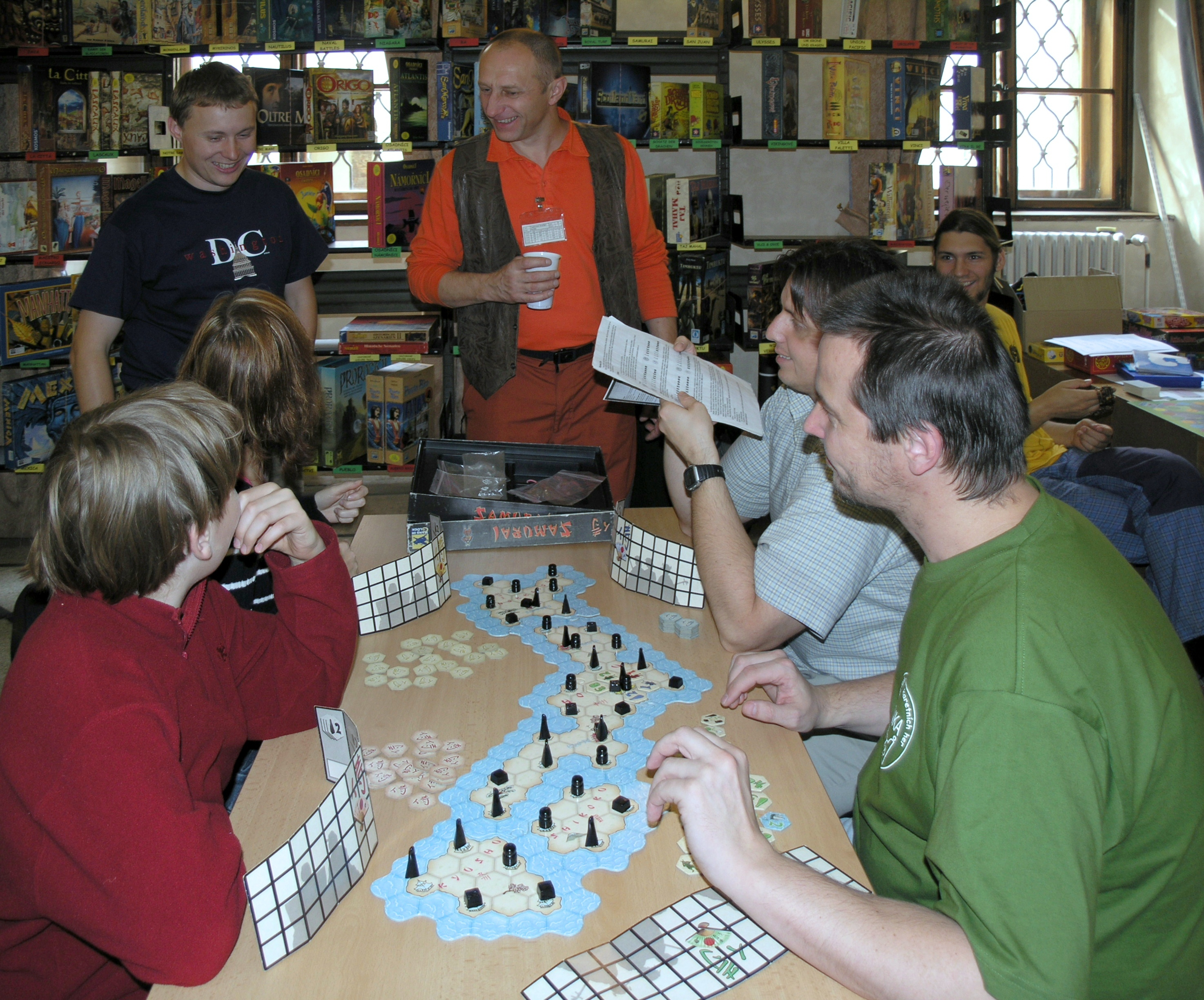 Deskohraní 2008